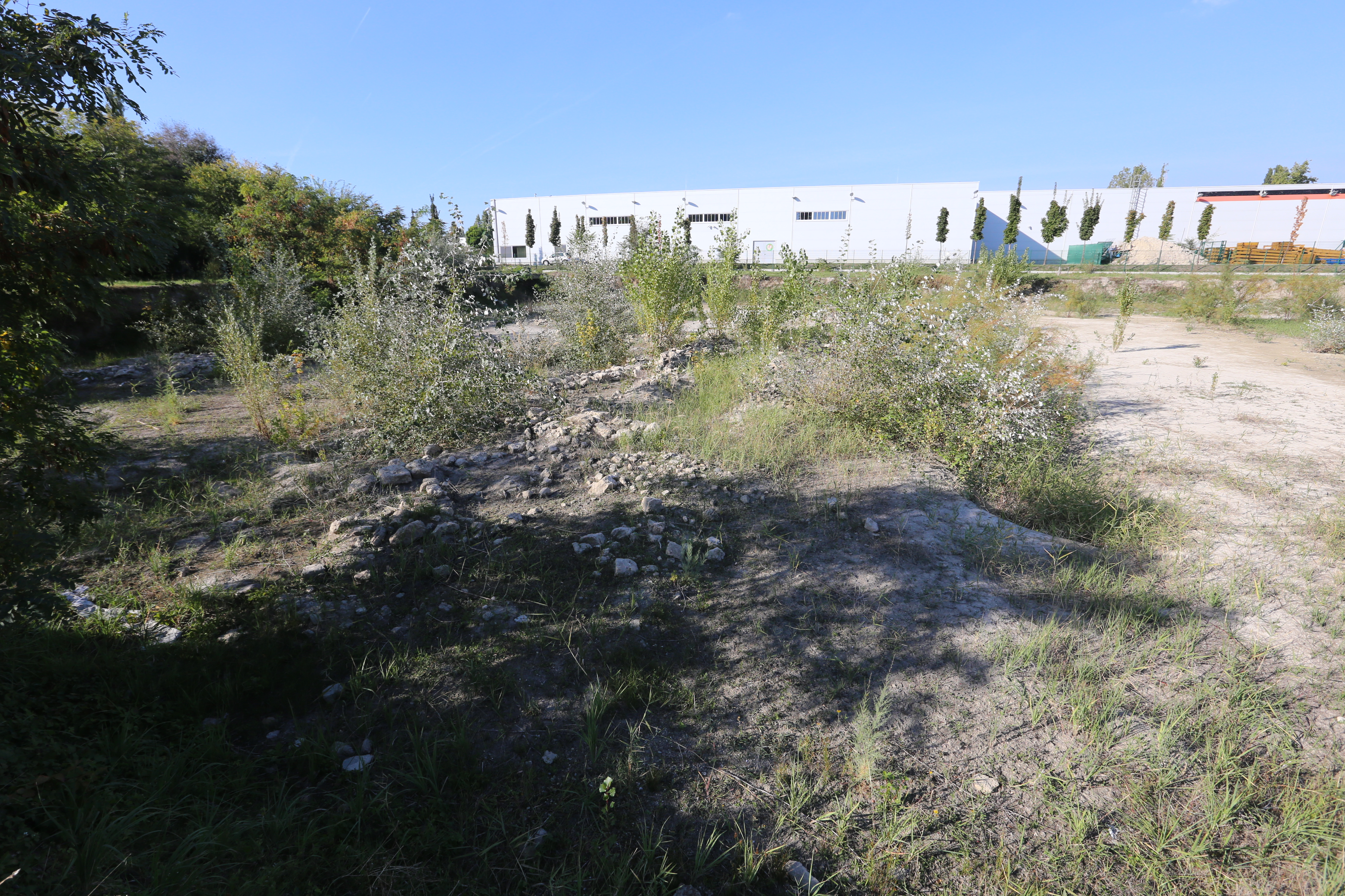 albertfalvai római tábor romjai This is a photo of a monument in Hungary. Identifier: 1103